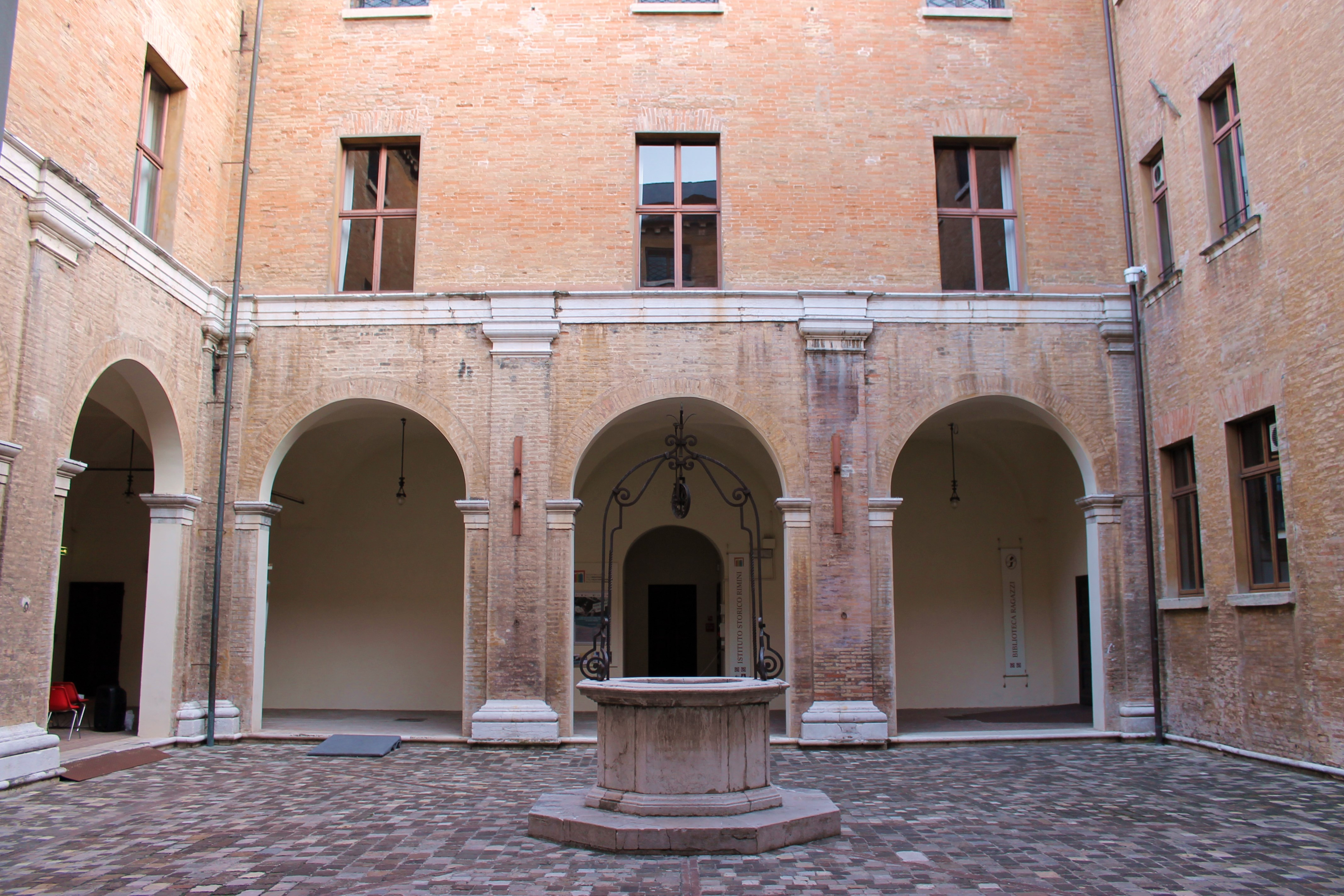 Biblioteca civica Gambalunga di Rimini This is a photo of a monument which is part of cultural heritage of Italy.